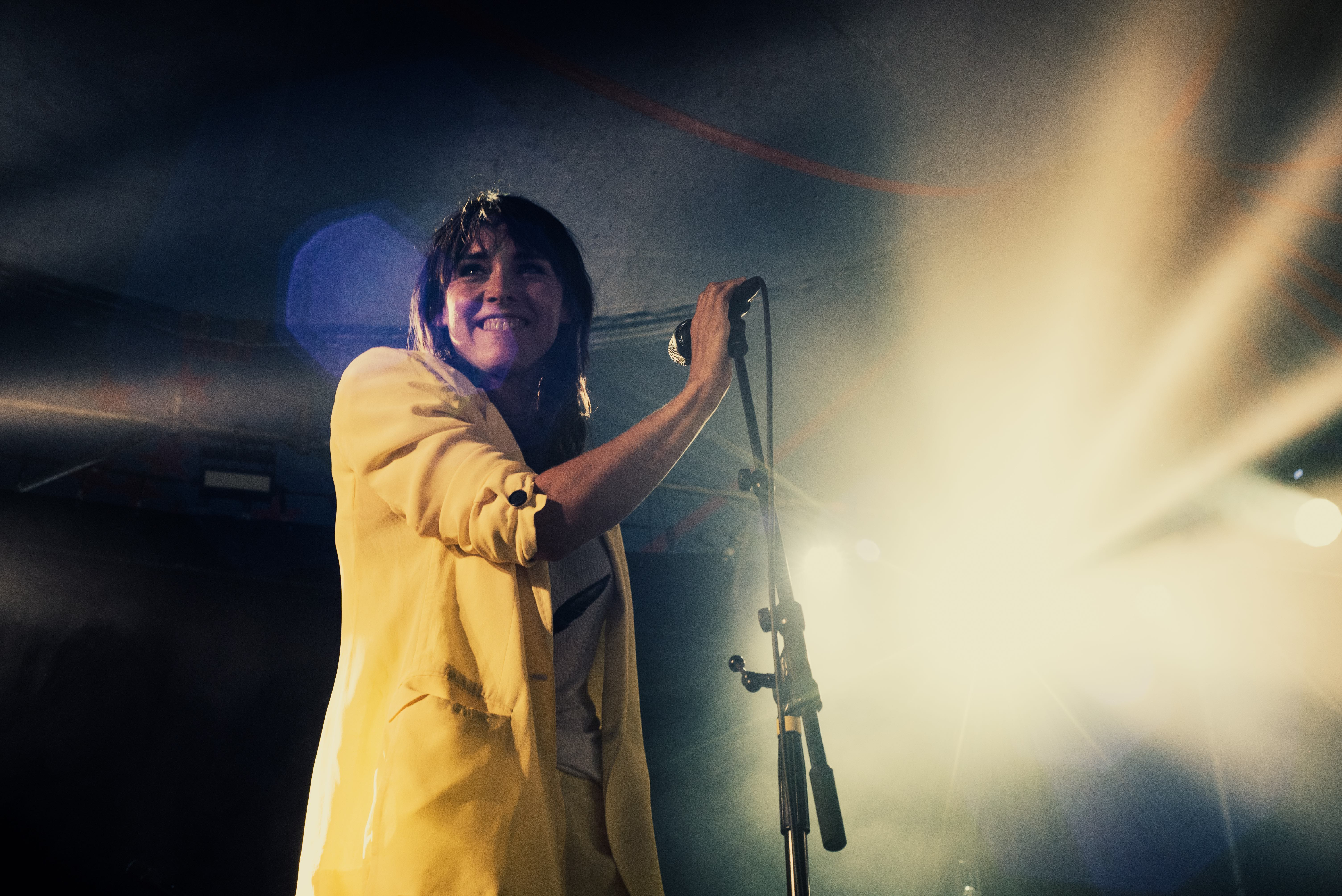 PB - WTTV18 WENDE - Jorah Terwisscha van Scheltinga